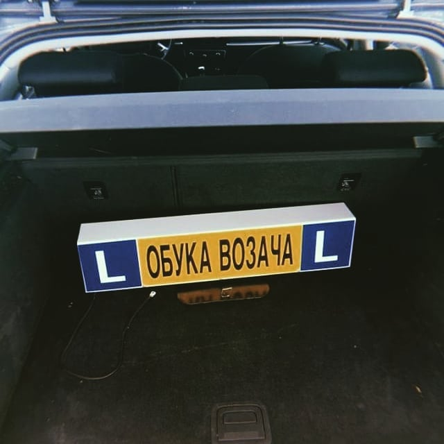 Svetleća tabla za vozilo